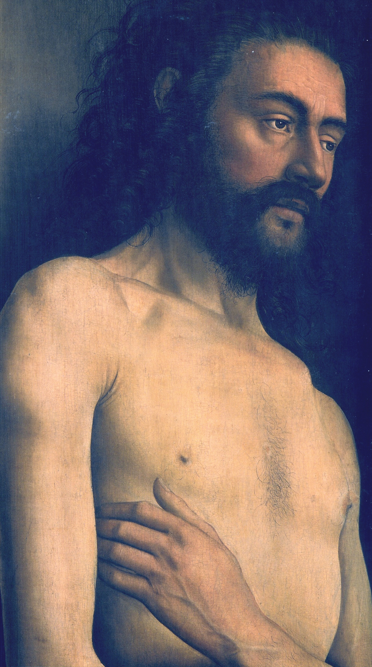 detail: Adam